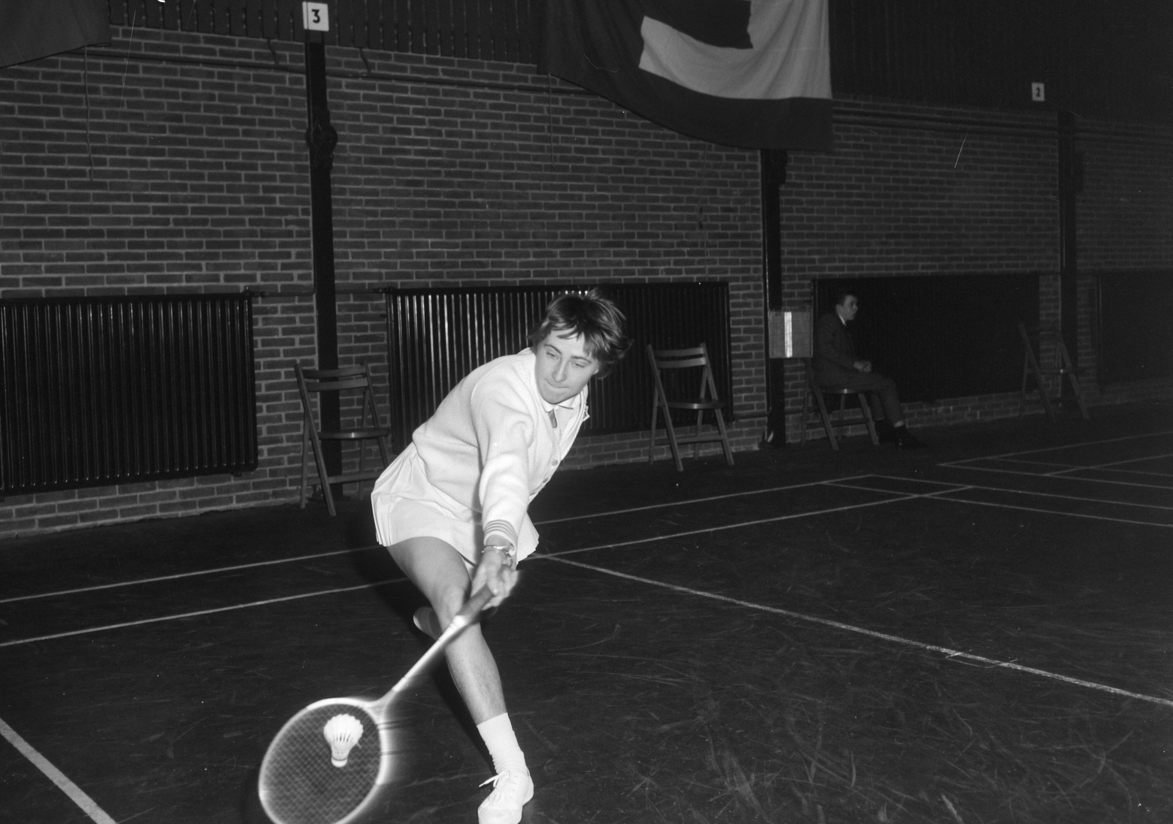 Collectie / Archief : Fotocollectie Anefo Reportage / Serie : [ onbekend ] Beschrijving : Internationale badmintonkampioenschappen te Haarlem, Gerda Schuhmacher (Duitsland) in actie Datum : 13 februari 1965 Locatie : Duitsland, Haarlem Trefwoorden : Badminton, kampioenschappen Fotograaf : Bilsen, Joop van / Anefo Auteursrechthebbende : Nationaal Archief Materiaalsoort : Negatief (zwart/wit) Nummer archiefinventaris : bekijk toegang 2.24.01.04 Bestanddeelnummer : 917-4268